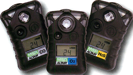 čidlo 2